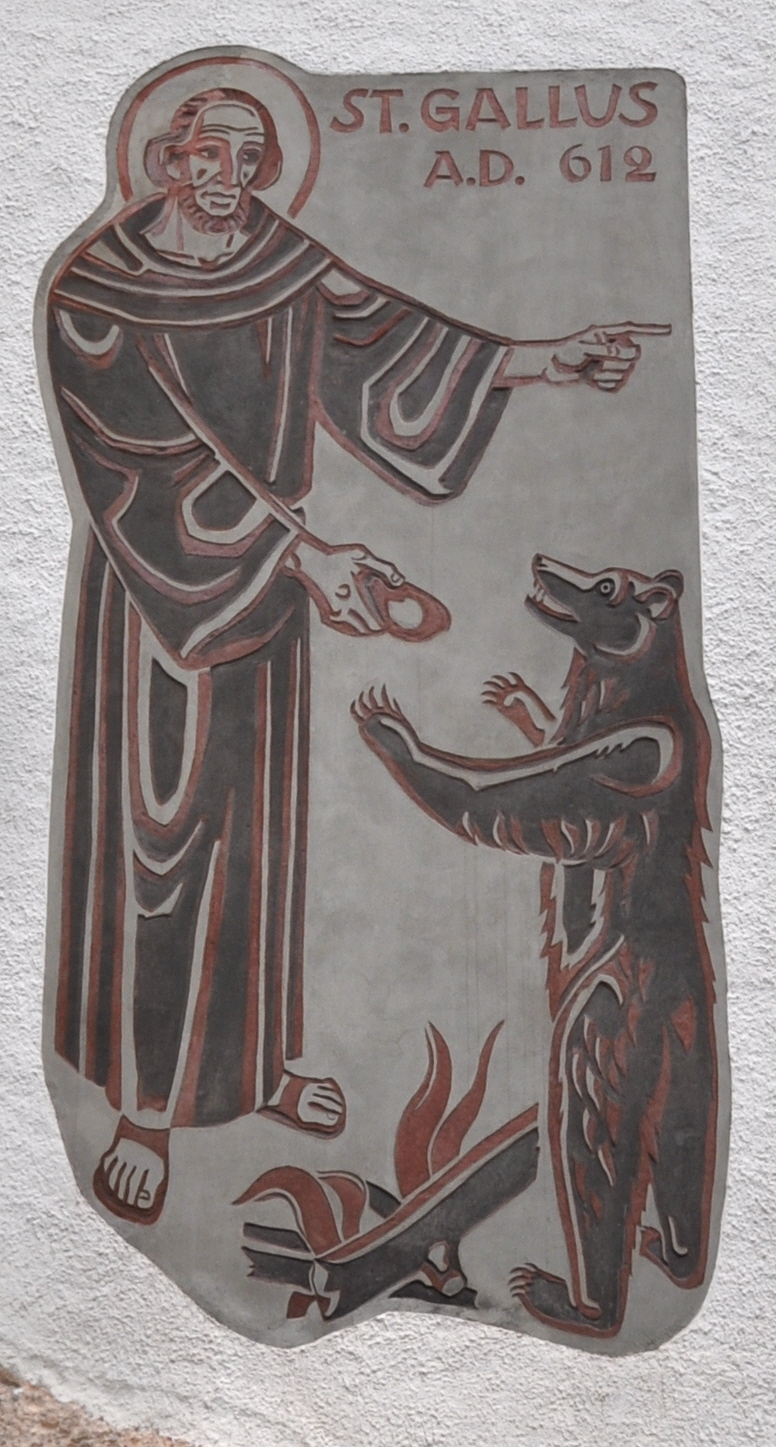 St. Gallen, Wandgemälde mit dem hl. Gallus und dem Bären, an der Stelle am Steinach-Fall, an der er nach der Legende den Dornbusch auffand